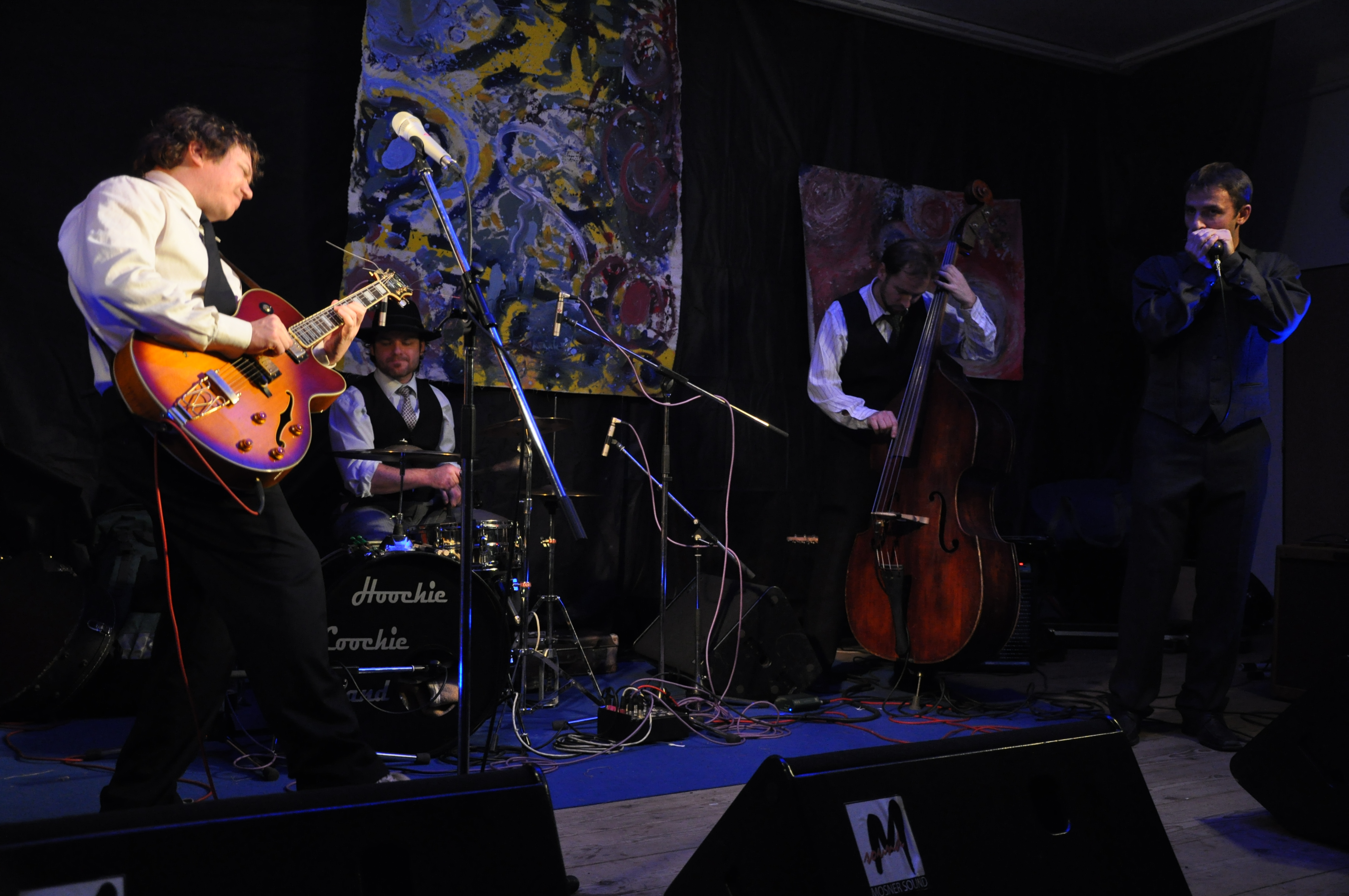 Skupina Hoochie Coochie Band na festivalu Daňkovický bigbít 12. prosince 2009